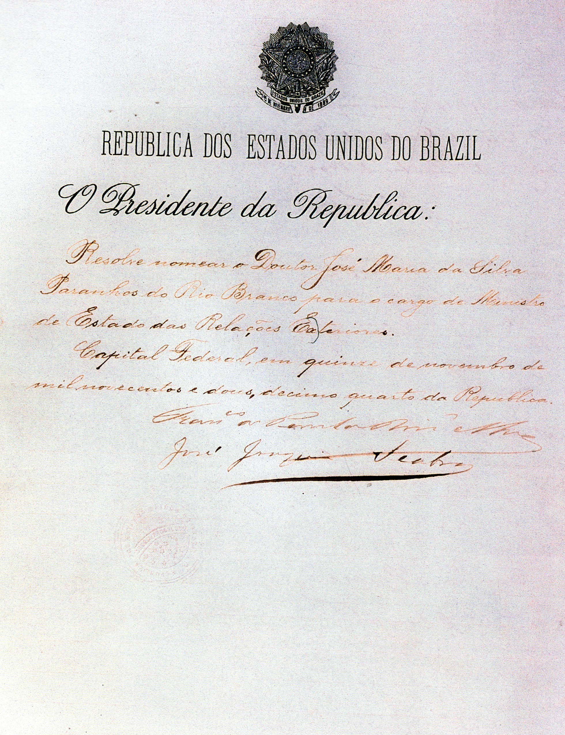 Decreto do presidente Rodrigues Alves, em 1902, nomeação do Barão do Rio Branco para o MRE do Brasil.